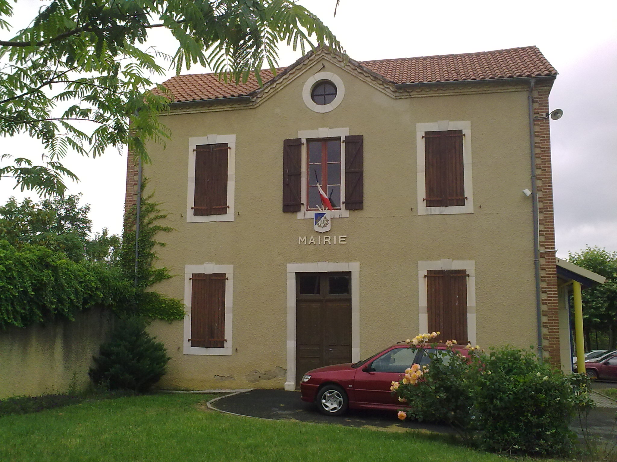 Monpezat